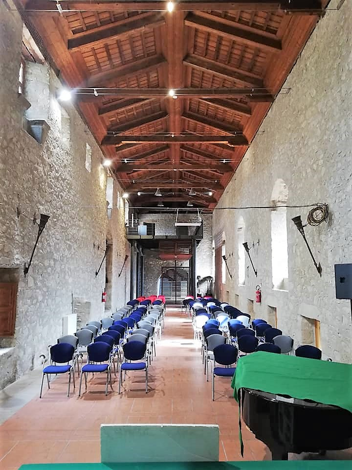 Ala occidentale adibita a sala convegni.